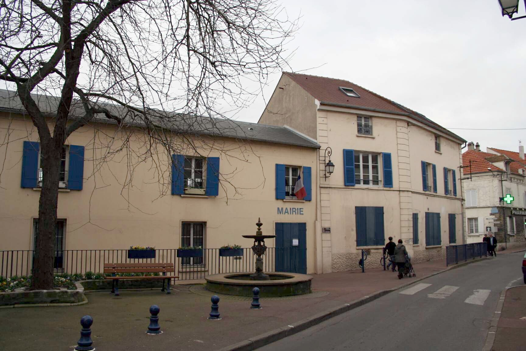 Mairie de Carrières-sur-Seine - Yvelines (France).